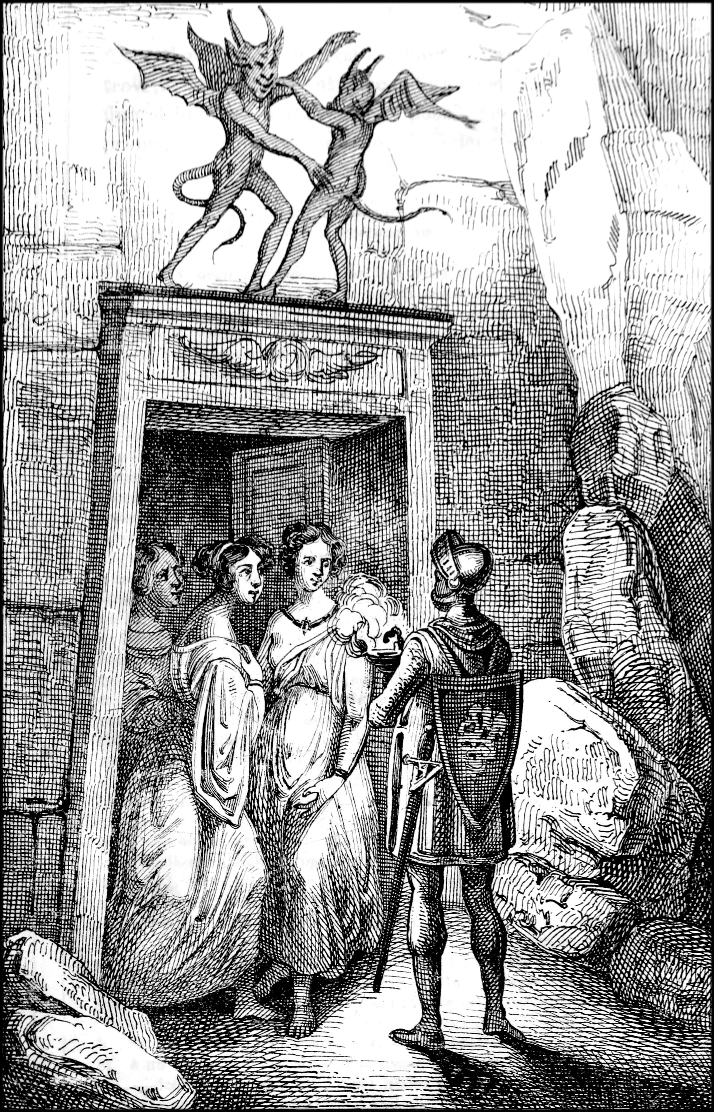 Illustrazione da Guerino detto il Meschino, di Andrea da Barberino, Milano, Tip. Guglielmini e Radaelli, 1841.